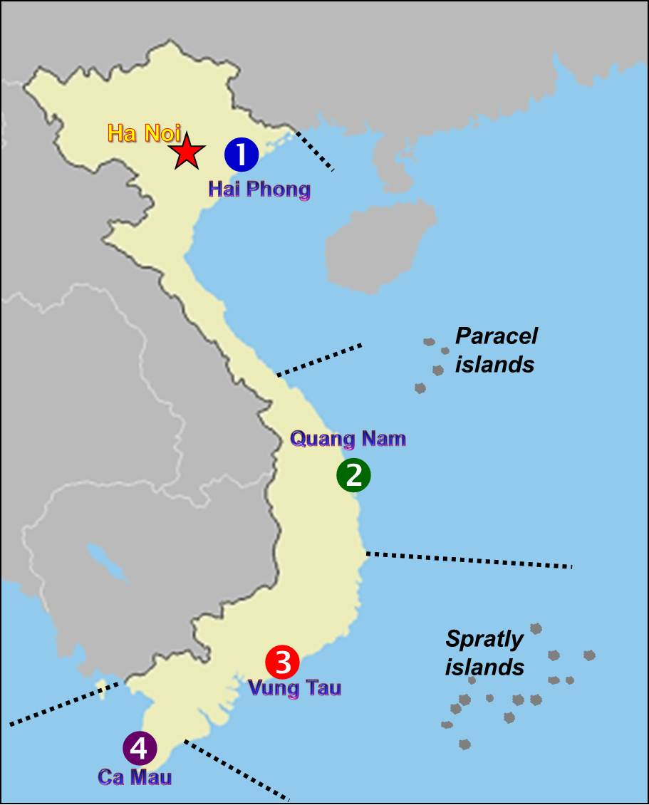 Vietnam Marine Police regions